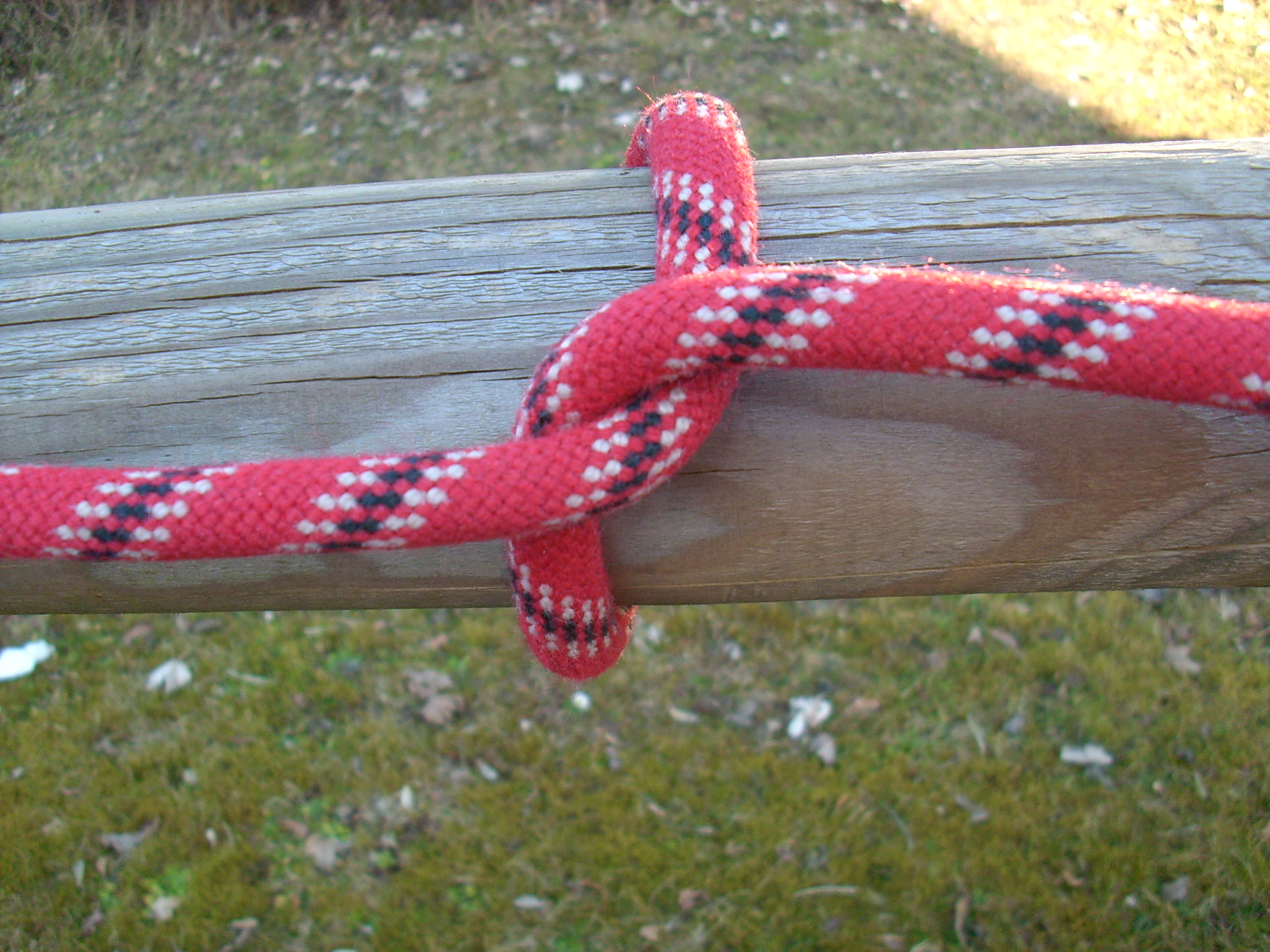 Halber schlag als Grundform beim Knüpfen